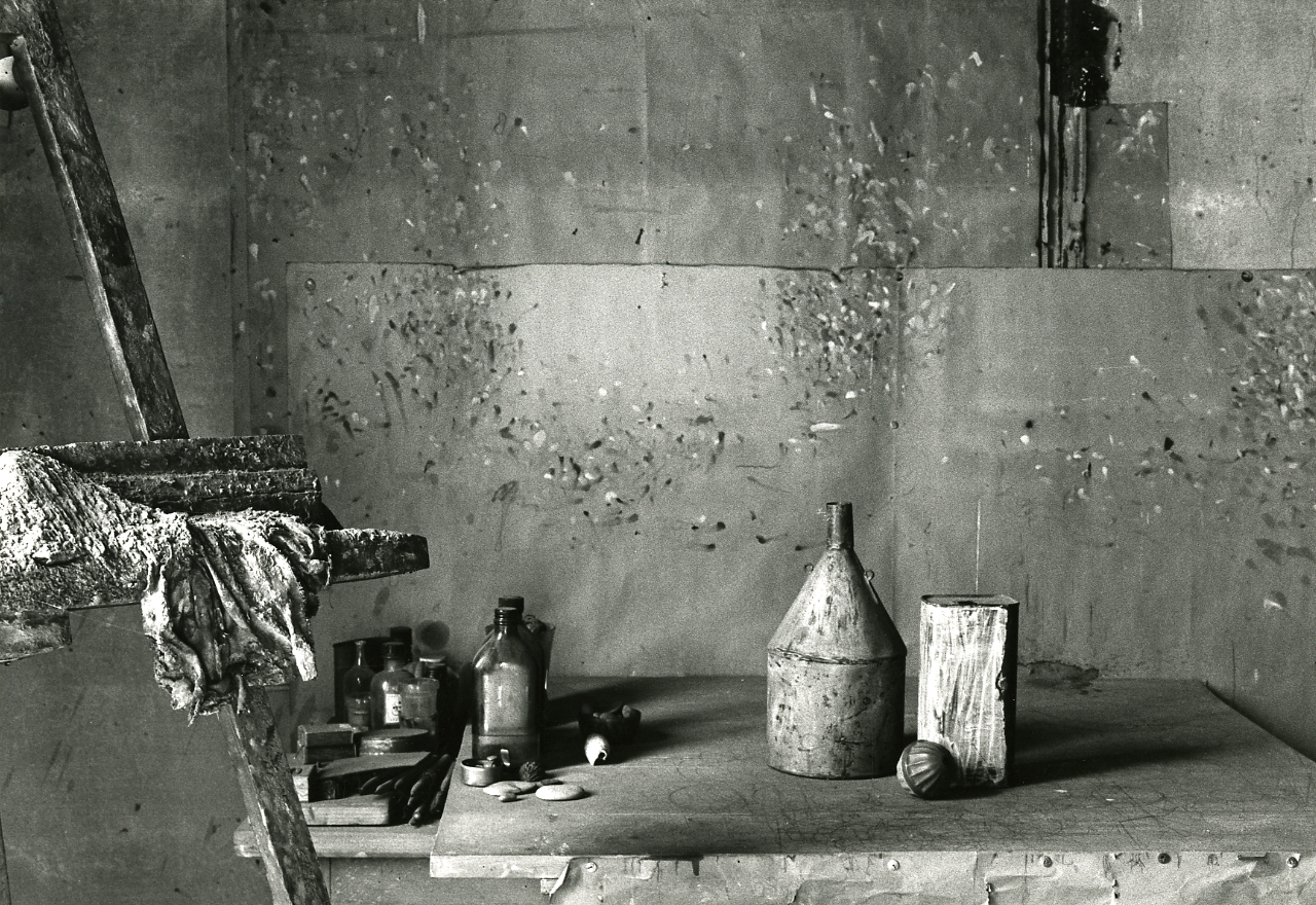 Servizio fotografico : Bologna, 1981 / Paolo Monti. - Stampe: 4 : Positivo b/n, gelatina bromuro d'argento/ carta, 24x24. - ((Al verso delle stampe manoscritto numero di negativo corrispondente: 3730/18, 3730/24, 3730/34, 3730/37. Sul coperchio della scatola, manoscritto a pennarello: "Nature morte. Composizioni". - Occasione: Documentazione per mostra del pittore Giorgio Morandi negli Stati Uniti (riprese eseguite in collaborazione con il Professor Nino Castagnoli). - Fonte: Agenda di Paolo Monti: Nikon Leika 3001-/ Monti 1978 (1978-1982), presso Archivio Paolo Monti. - Fonte: Fattura di Paolo Monti: IV. Commesse/ Fattura n. 36/ Fotografie per mostra del pittore Morandi negli Stati Uniti (1981/10/22), presso Archivio Paolo Monti. N. 72 fotografie stampate in formato 24x30 e 30x40 dei luoghi appenninici e dello studio del pittore Giorgio Morandi. - Fonte: Monografia: L'immagine dell'Appennino bolognese: dai disegnatori dell'Ottocento a Giorgio Morandi, catalogo della mostra, Grizzana Morandi 1984, a cura di Stefano Calabrese, Silvia Camerini, Bologna, Nuova Edizioni Alfa (1984)